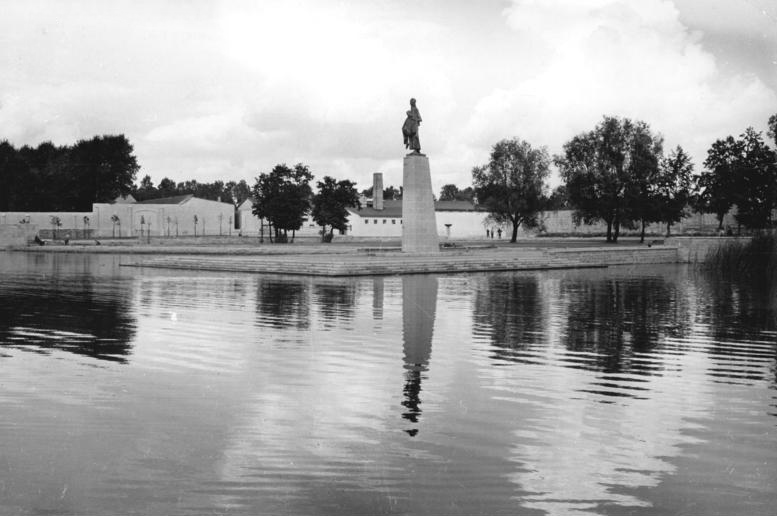 Mahn- und Gedenkstätte Ravensbrück, Teilansicht Zentralbild Zühlsdorf Heilig 1.9.1959 Nationale Mahn- und Gedenkstätte Ravensbrück. Am 12. September 1959 wird die Gedenkstätte der Öffentlichkeit feierlich übergeben. UBz: Teilansicht von der Gedenkstätte Ravensbrück. [Mahn- und Gedenkstätte für das Konzentrationslager Ravensbrück, Teilansicht vom Schwedtsee mit Skulptur "Tragende" von Will Lammert]